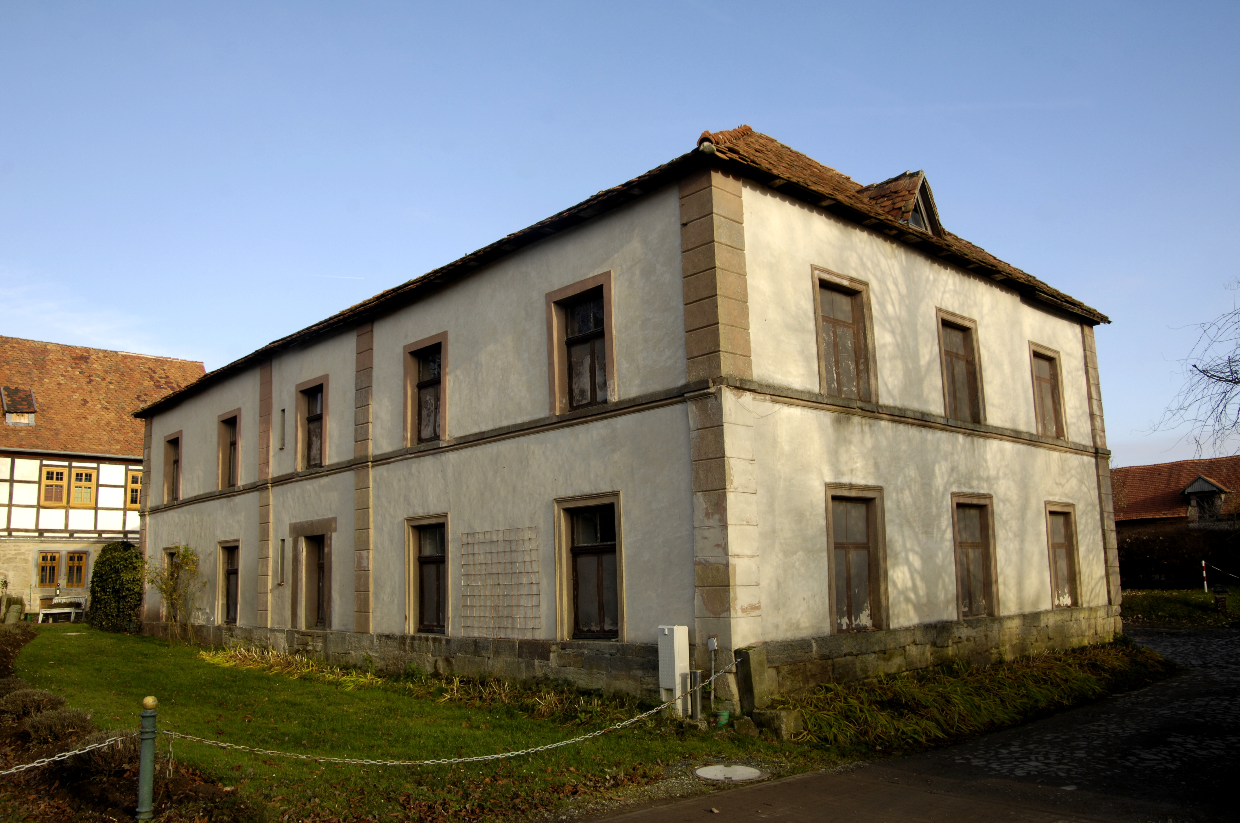 Gut Bodenhausen This is a photograph of an architectural monument.It is on the list of cultural monuments of Habichtswald